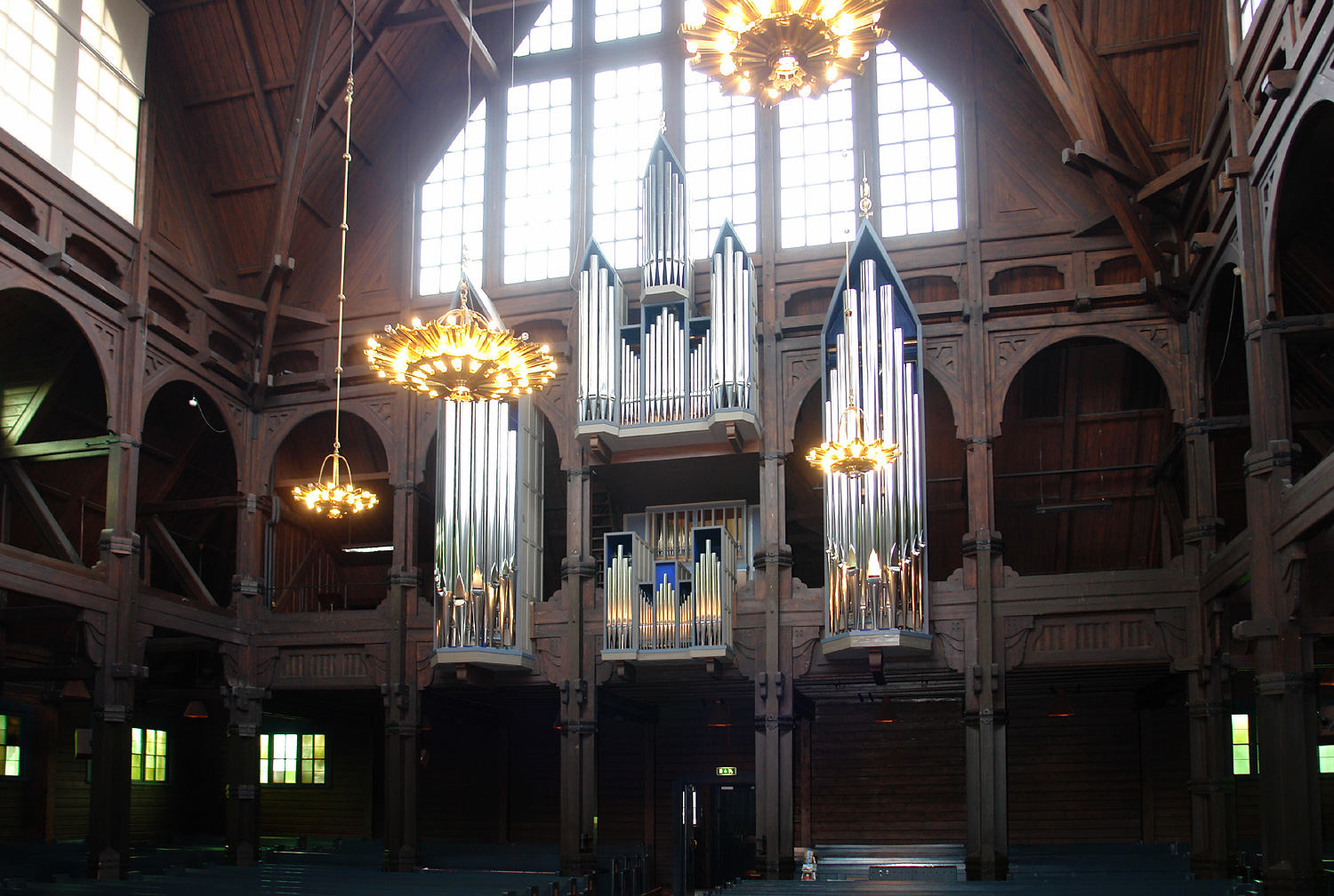 Kirche von Kiruna: Die Orgel mit 40 Registern und 4 Pedalen wurde 1957 von der deutschen Orgelbaufirma Beckerath erstellt.